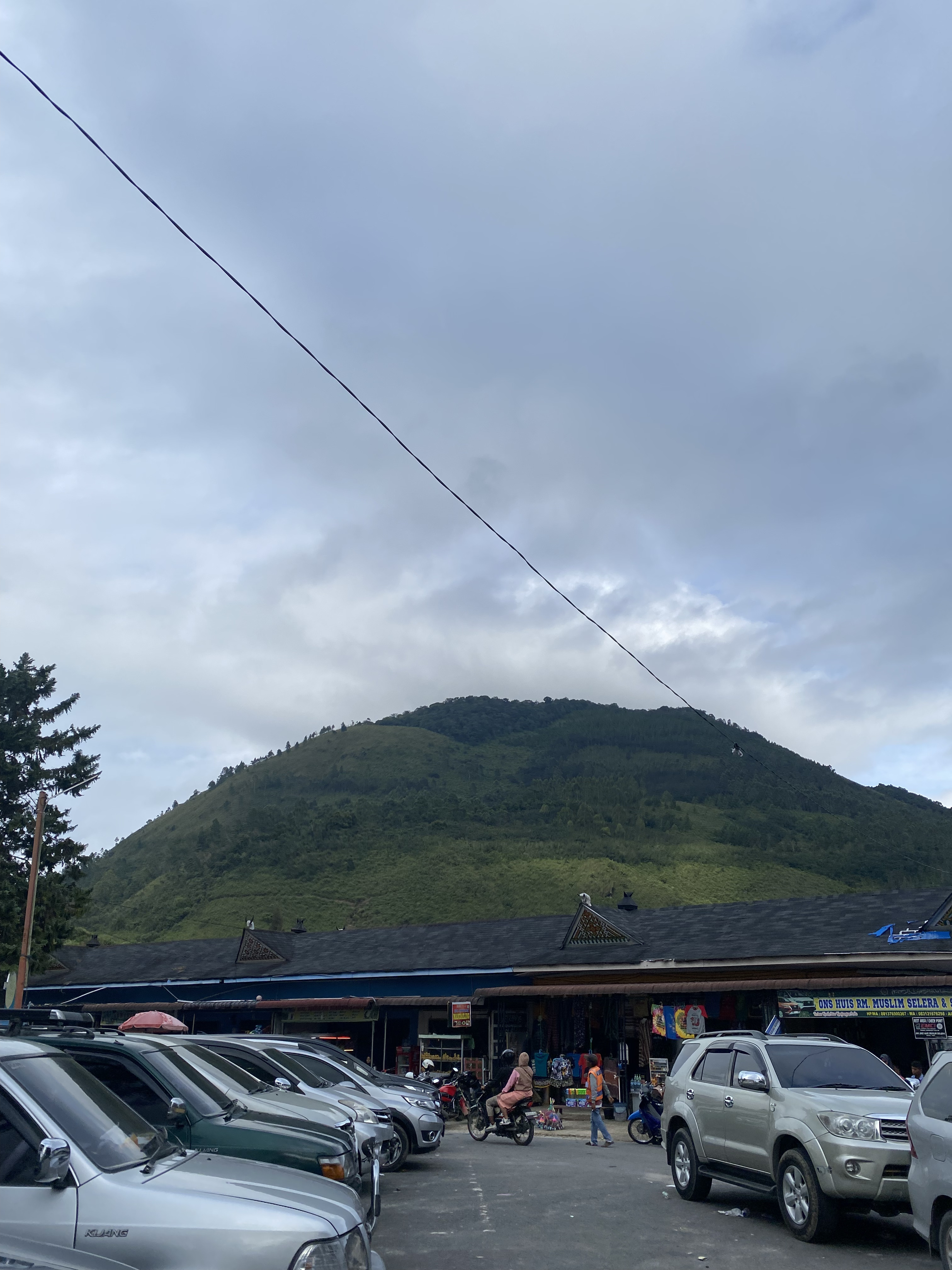 smk Bukit Rangin